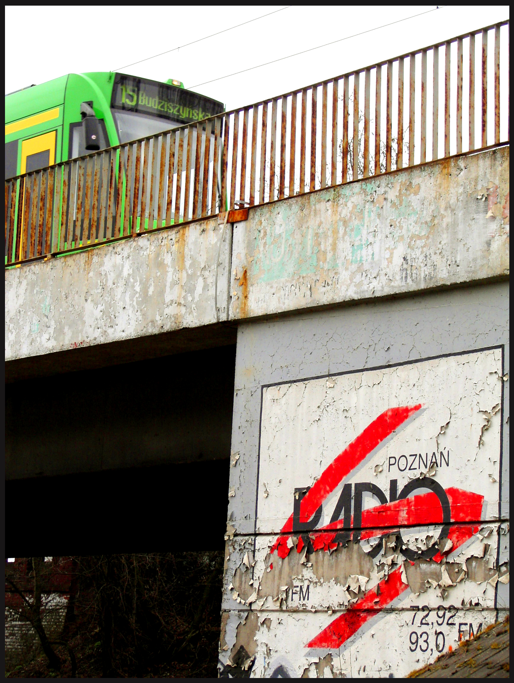 Niszczejąca, archiwalna reklama Radia S Poznań